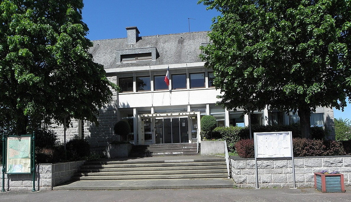 Mairie de L'Hermitage (35).